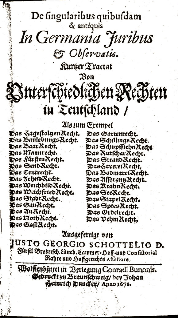 Weichbilt Recht, wersja niemiecka z roku 1671; Georgio Schottelio